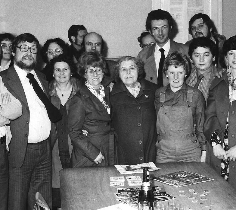 action festive de militants socialistes à Reims, Hubert Carpentier, Aimée Lallement, Madeleine Dupuis.